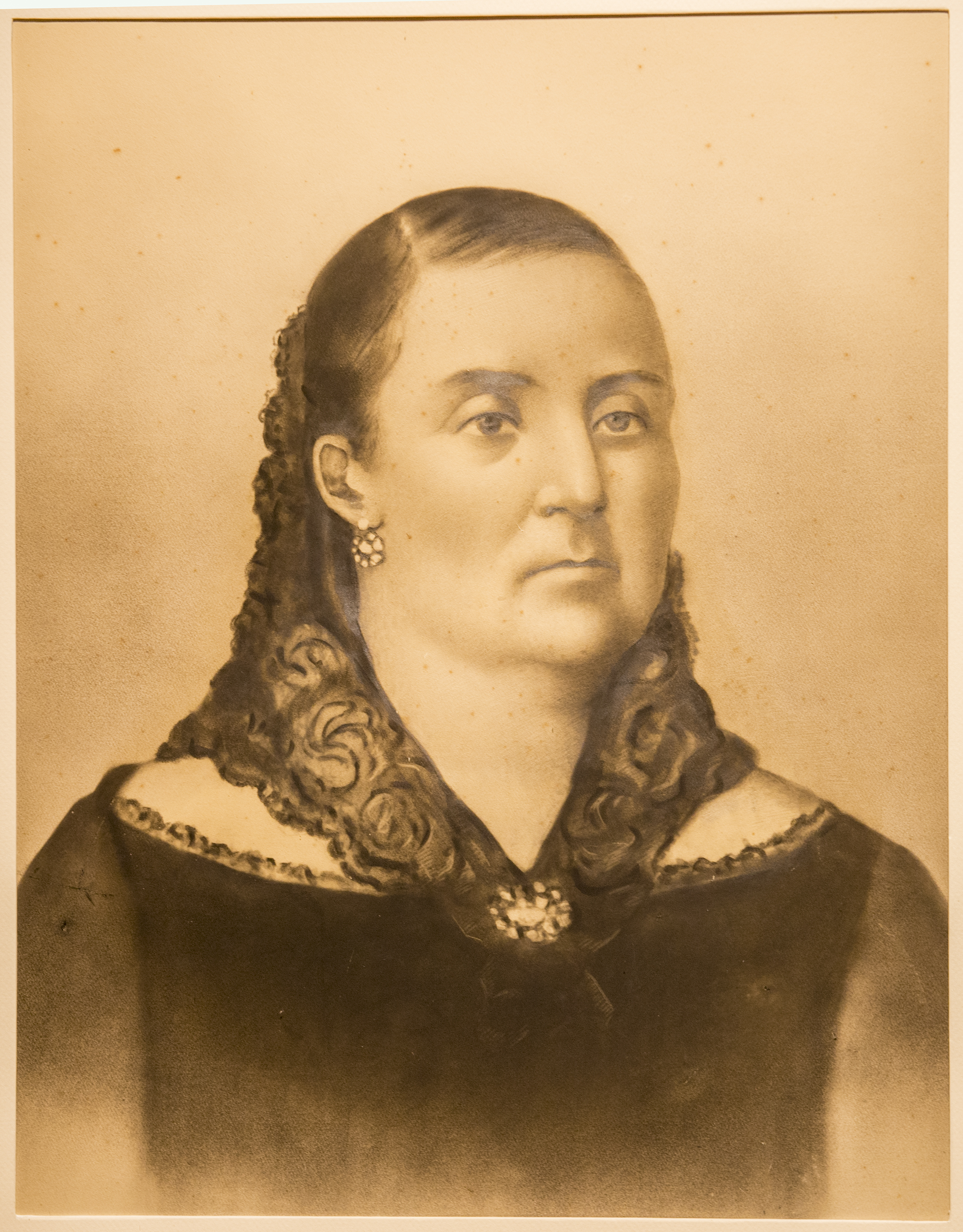 Carbonilla sobre papel, autor desconocido. 56x43,5 cm, Museo del Cabildo de Montevideo